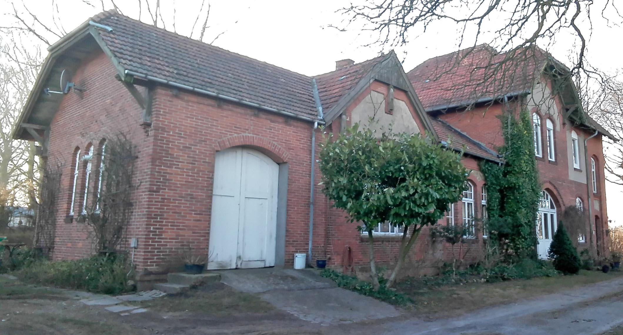 Ragebøl Station fra vejsiden